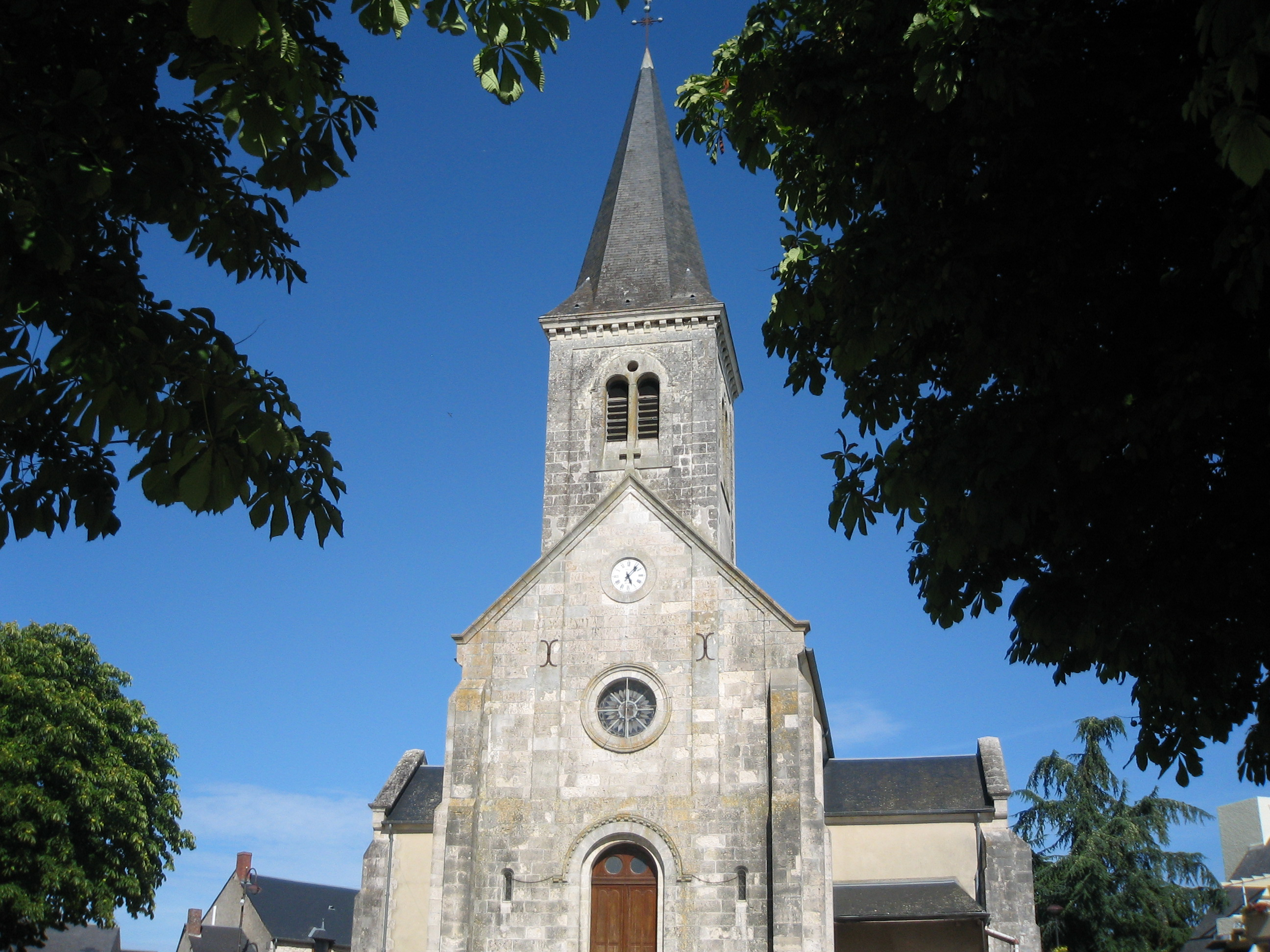 Eglise Saint-Ursin, La Chapelle Saint Ursin.